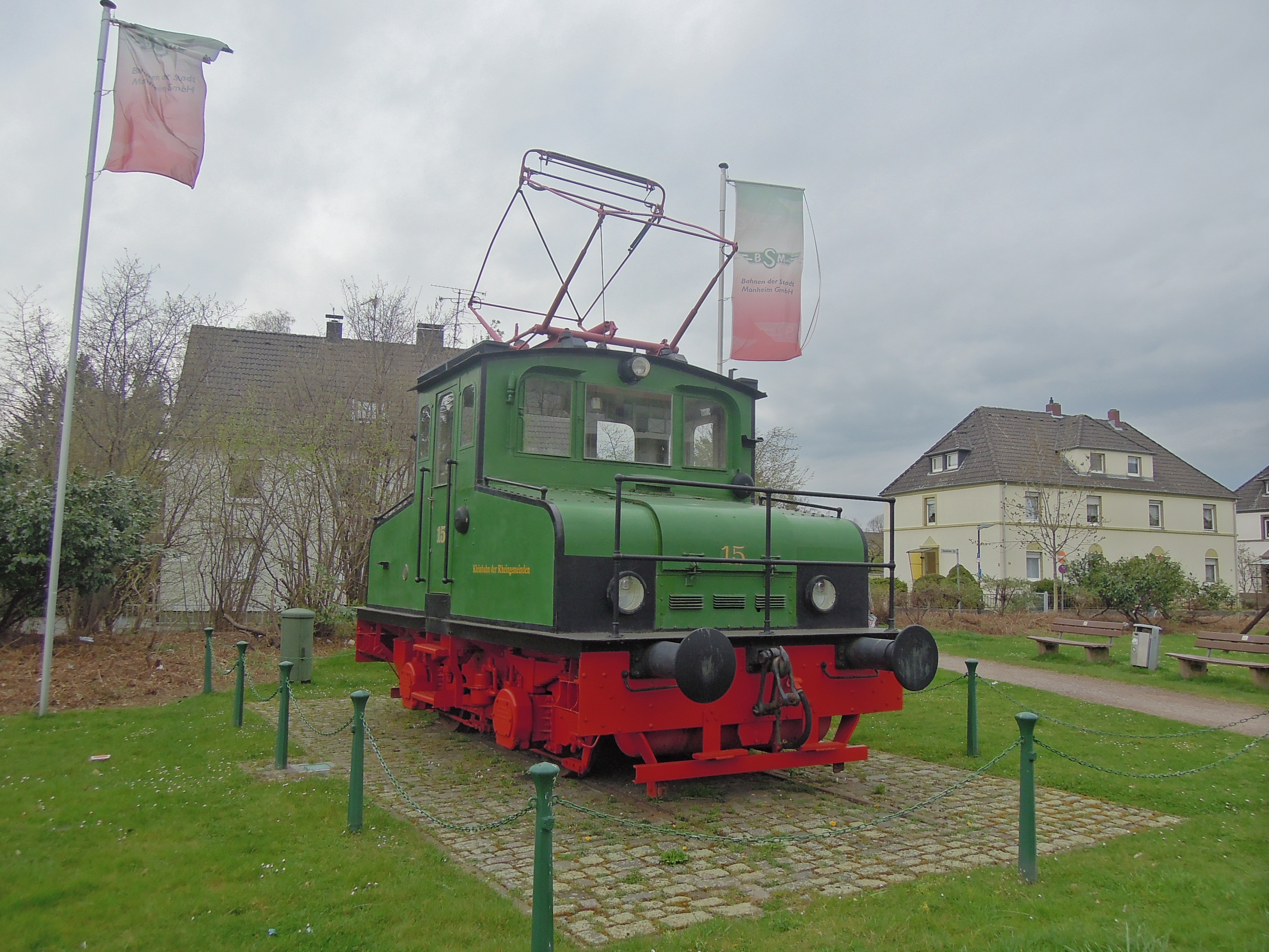 AEG-Lok 15 der Bahnen der Stadt Monheim als Denkmallokomotive in Monheim am Rhein, Rathausplatz